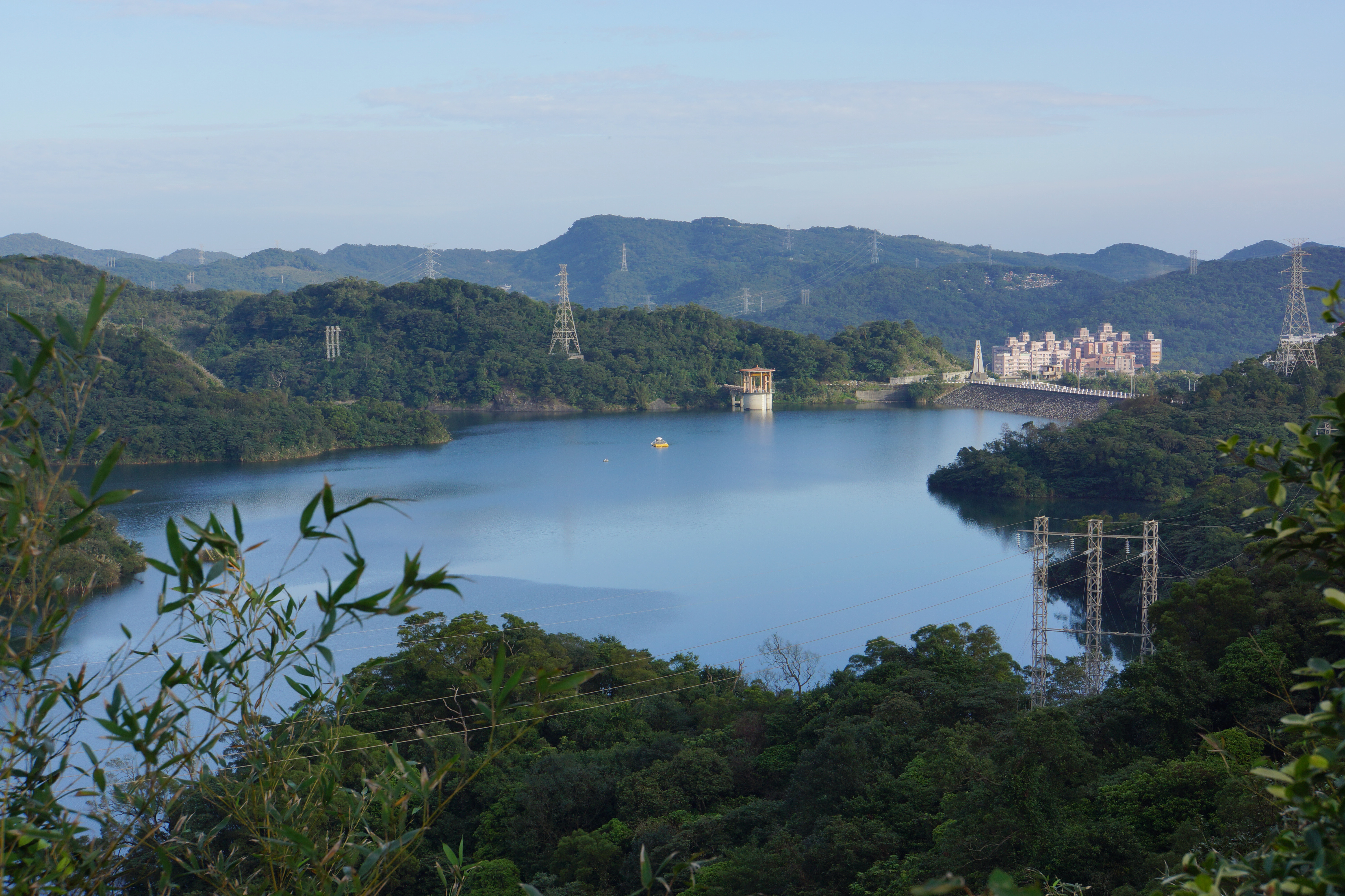 新山水庫 Xinshan Reservoir